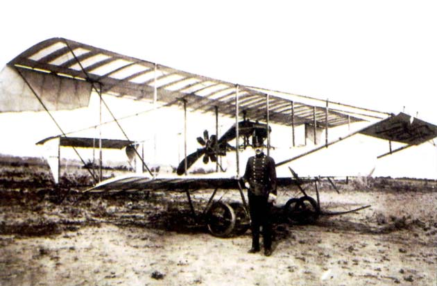 Lányi Antal kétszemélyesre átalakított Farman III. biplánja.